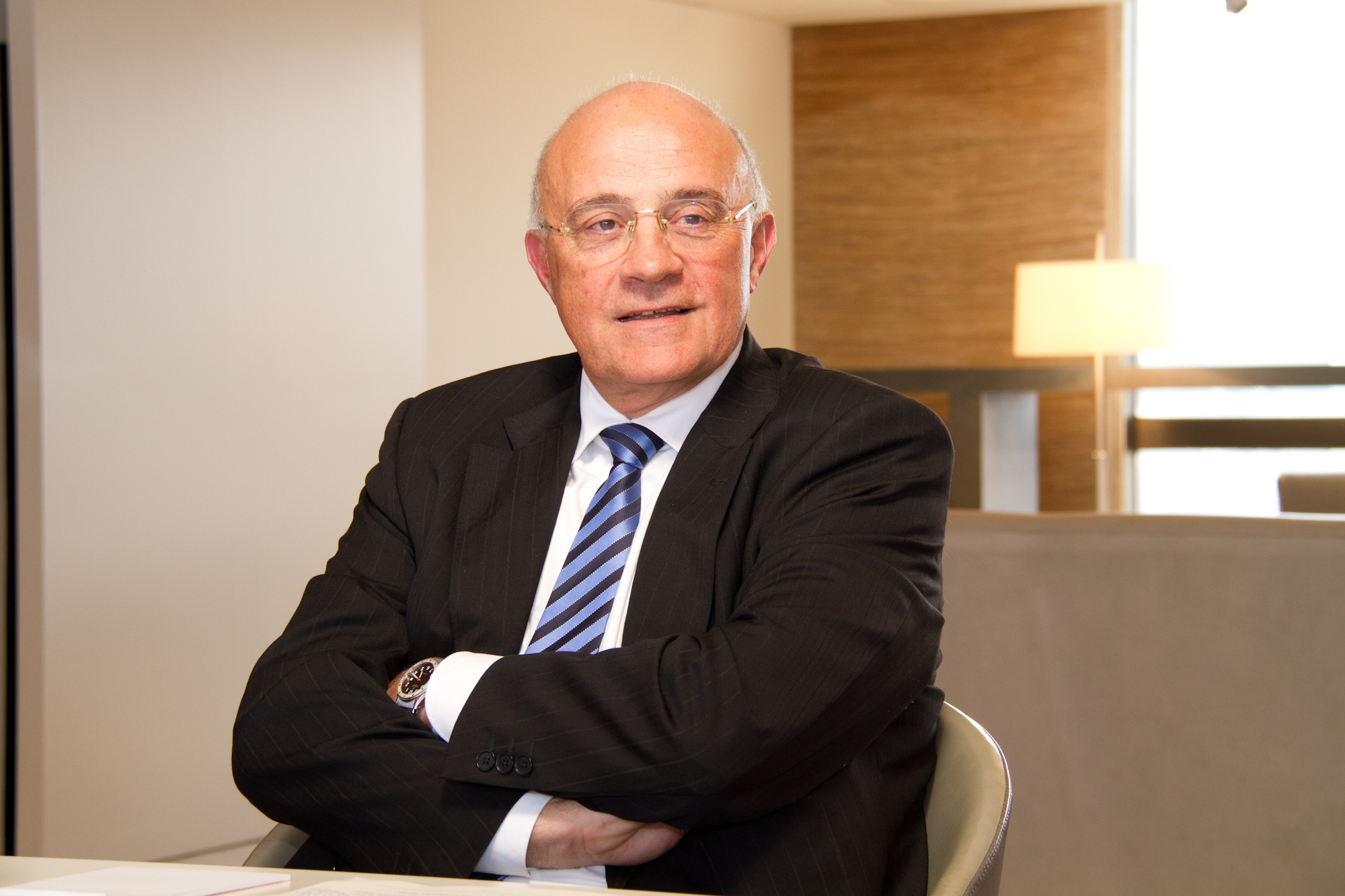 President de Banc de Sabadell